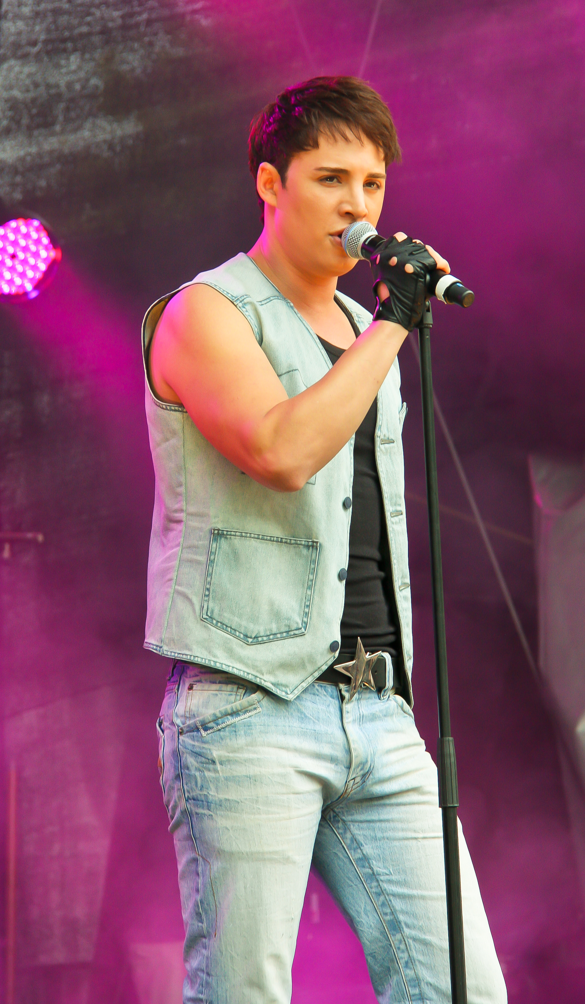 Fady Maalouf auf der Hauptbühne auf dem Heumarkt, Köln. Bühnenprogramm zum CSD-Straßenfest/ColognePride 2011.